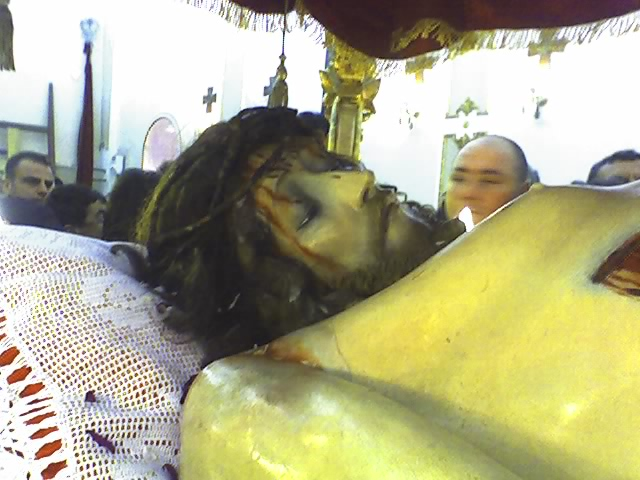 Licata; il Cristo morto.